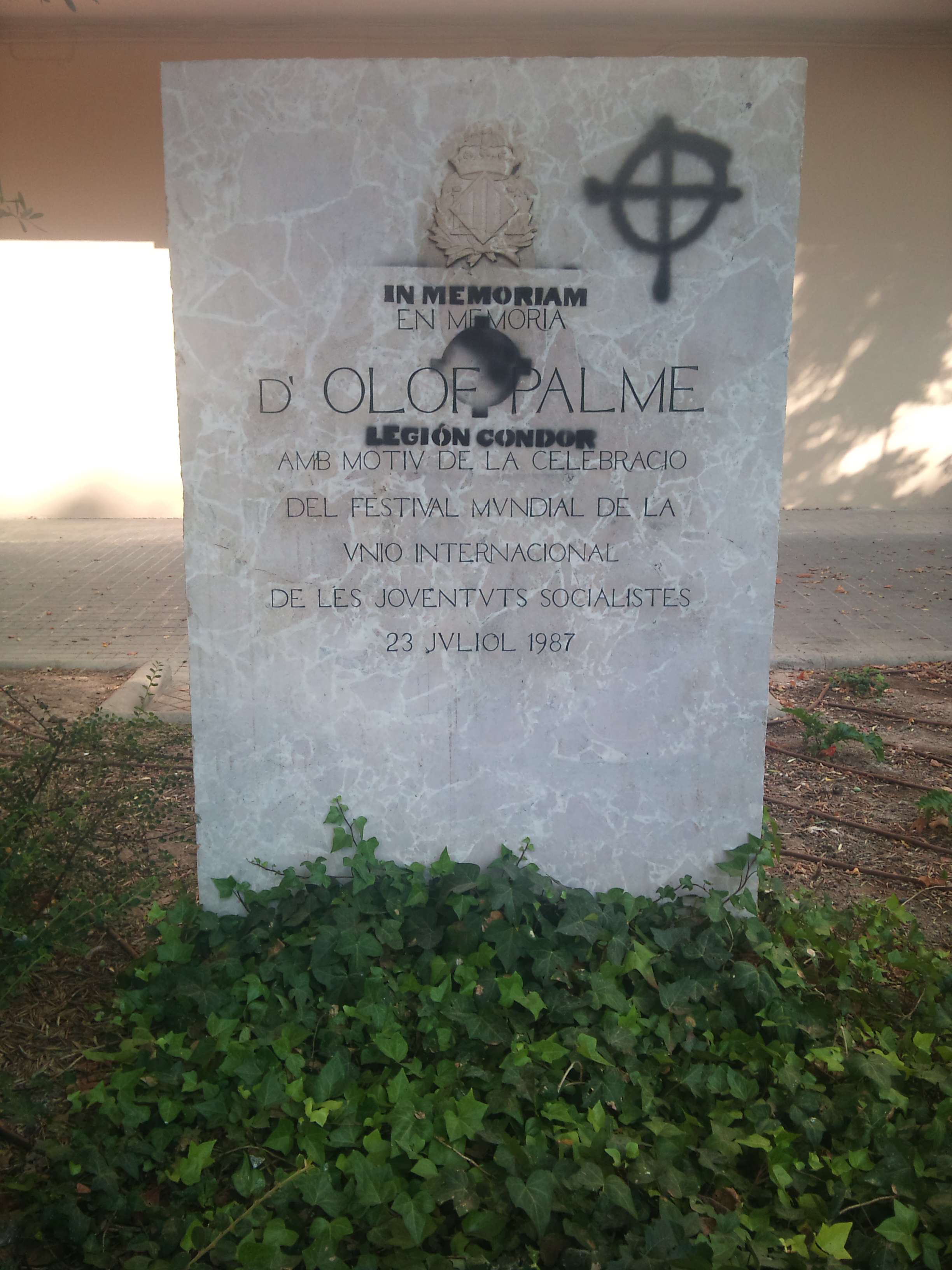 Monument a Olof Palme, a la plaça homònima a València. Ha estat vandalitzat amb pintades amb simbologia nazi, enaltint la legió còndor.